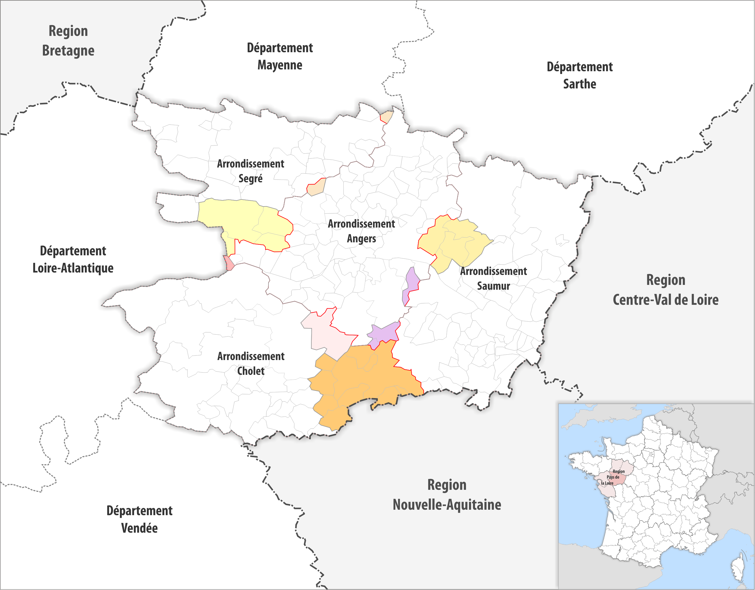 Arrondissements Anpassungen auf 2017 im Departement Maine-et-Loire